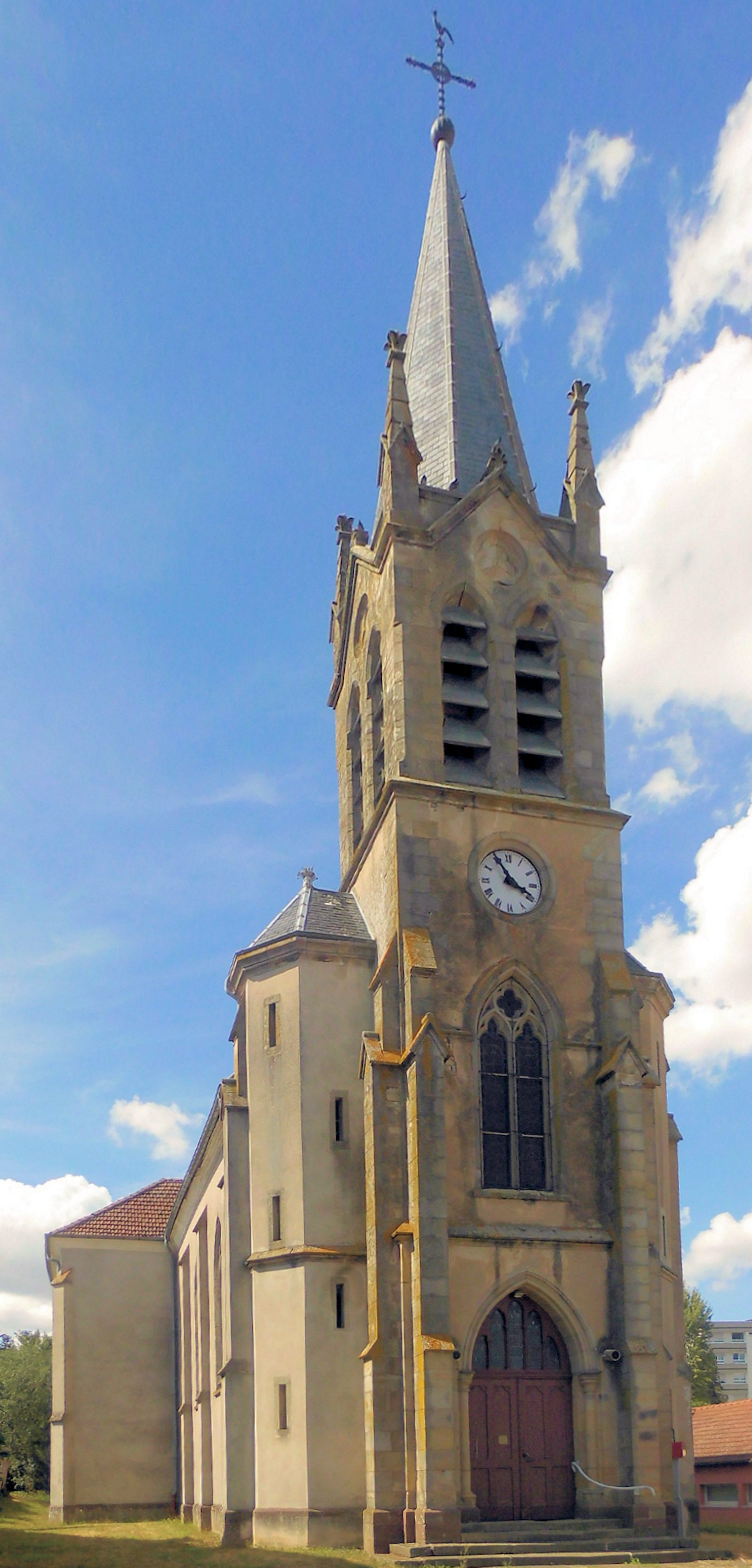 L'église Saint-Jean-Baptiste d'Hymont, côté sod